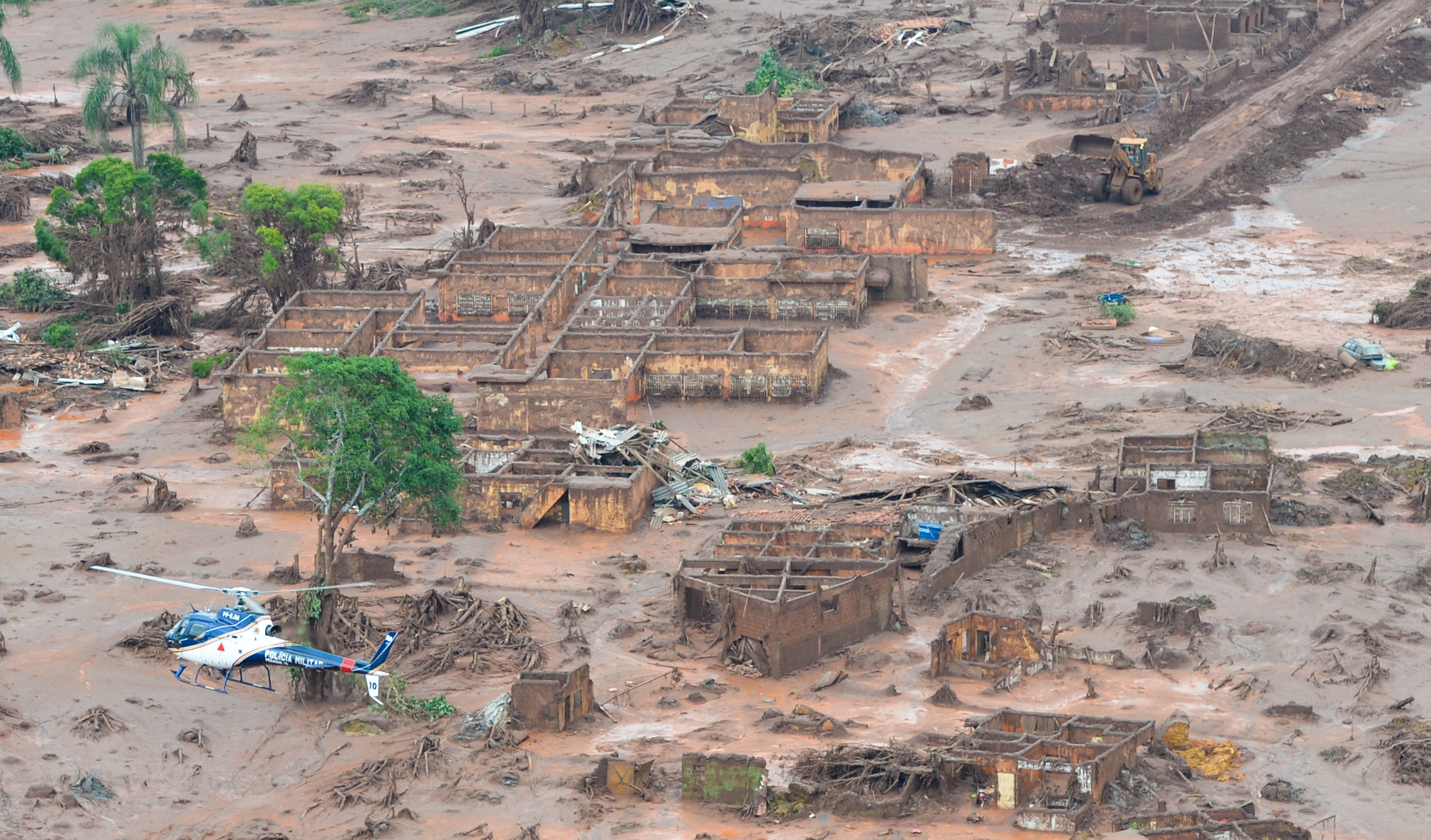 Mariana (MG) - Área afetada pelo rompimento de barragem no distrito de Bento Rodrigues, zona rural de Mariana, em Minas Gerais